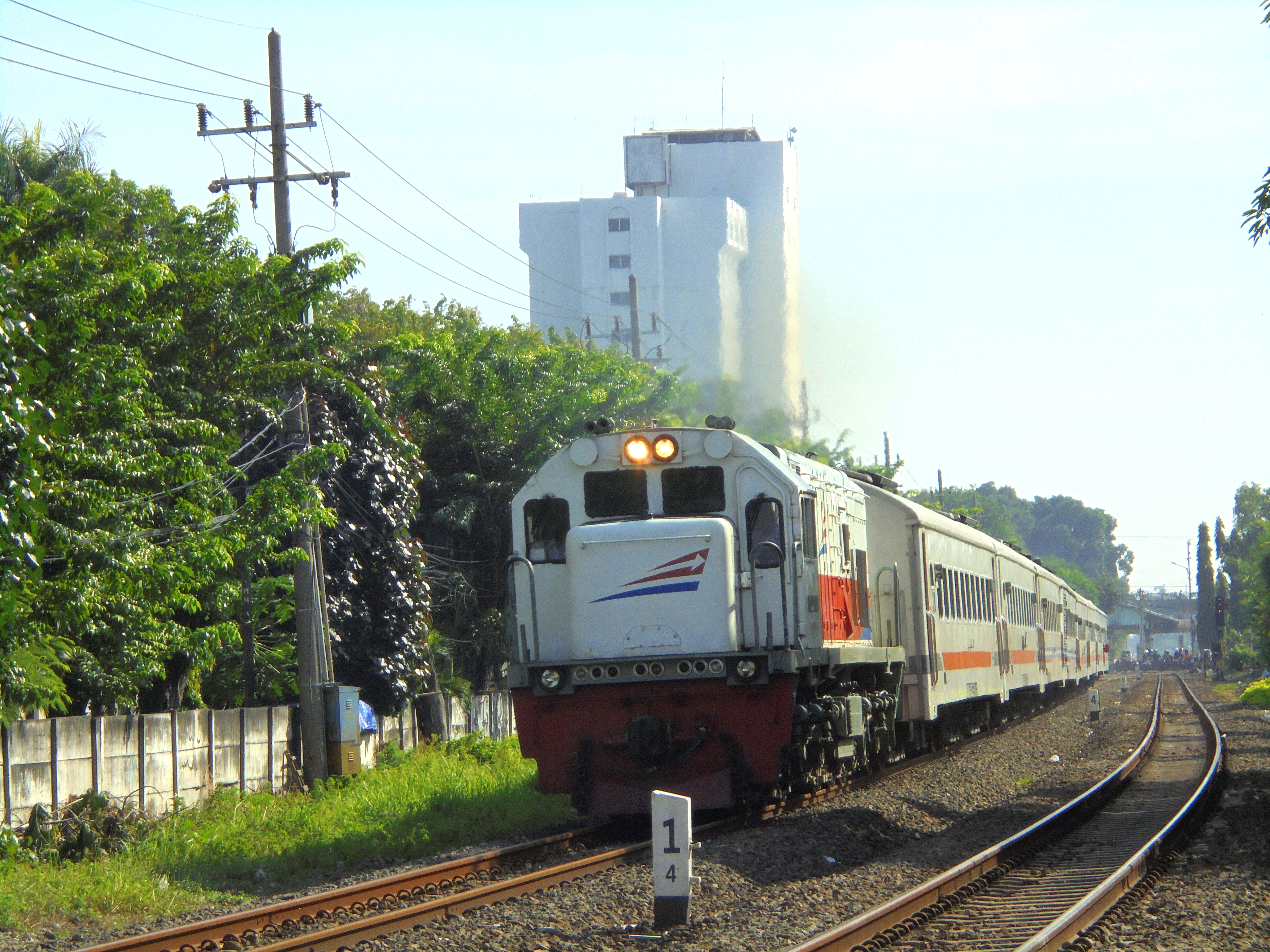 Kereta api lokal Kertosono setelah meninggalkan Stasiun Surabaya Gubeng, 2020